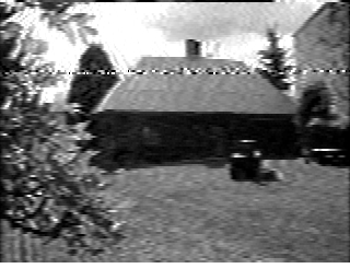 Obraz odkodowany w systemie BW/8 SSTV